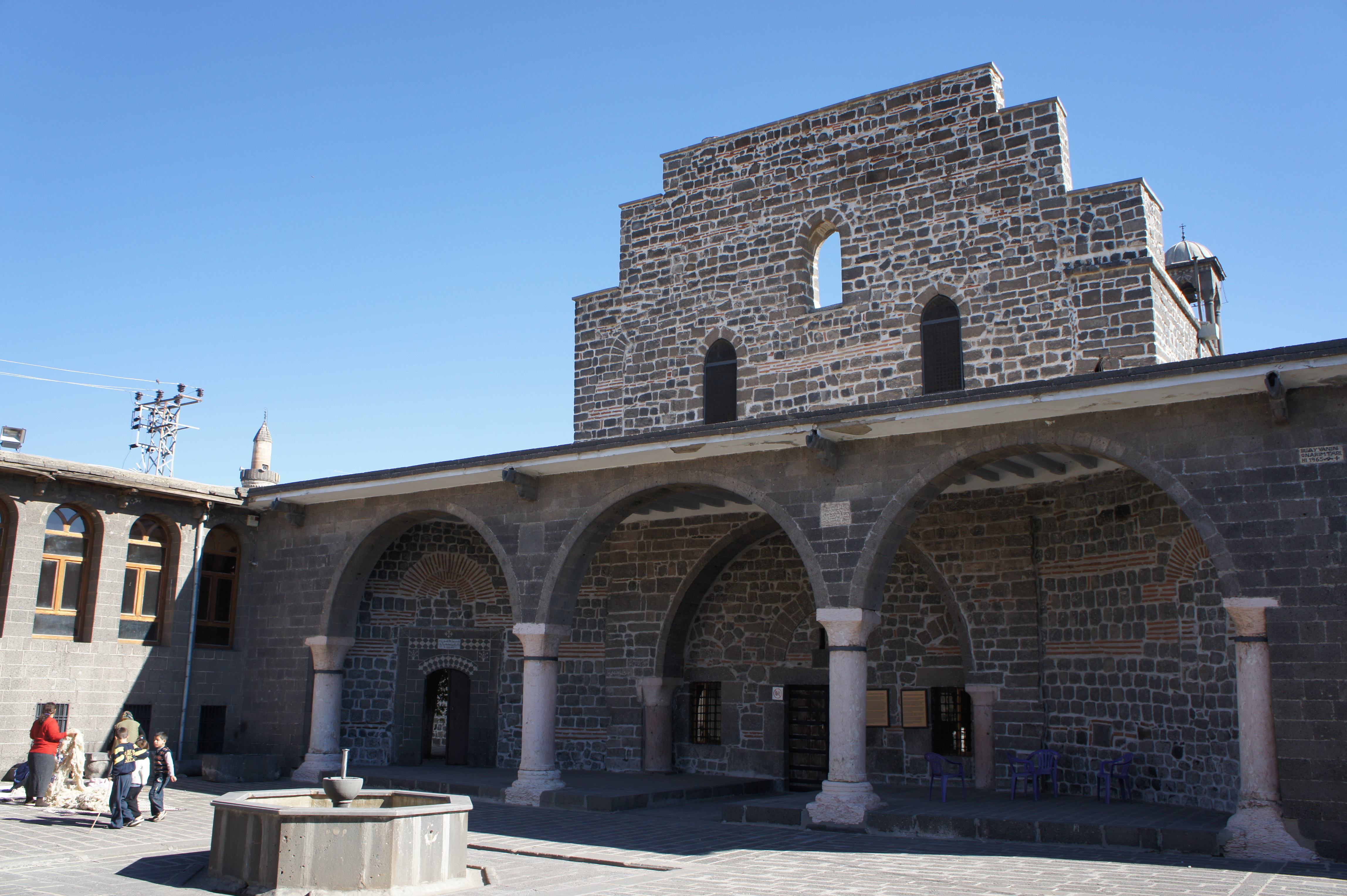 Kurdî: Dêra suriyaniyên ortodoks ên Amedê (Dêra Meryemê).